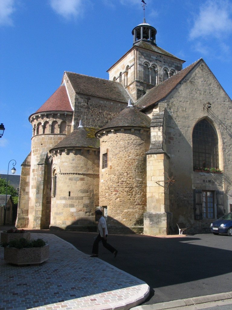 Eglise Notre Dame dite du Chapitre.JPG